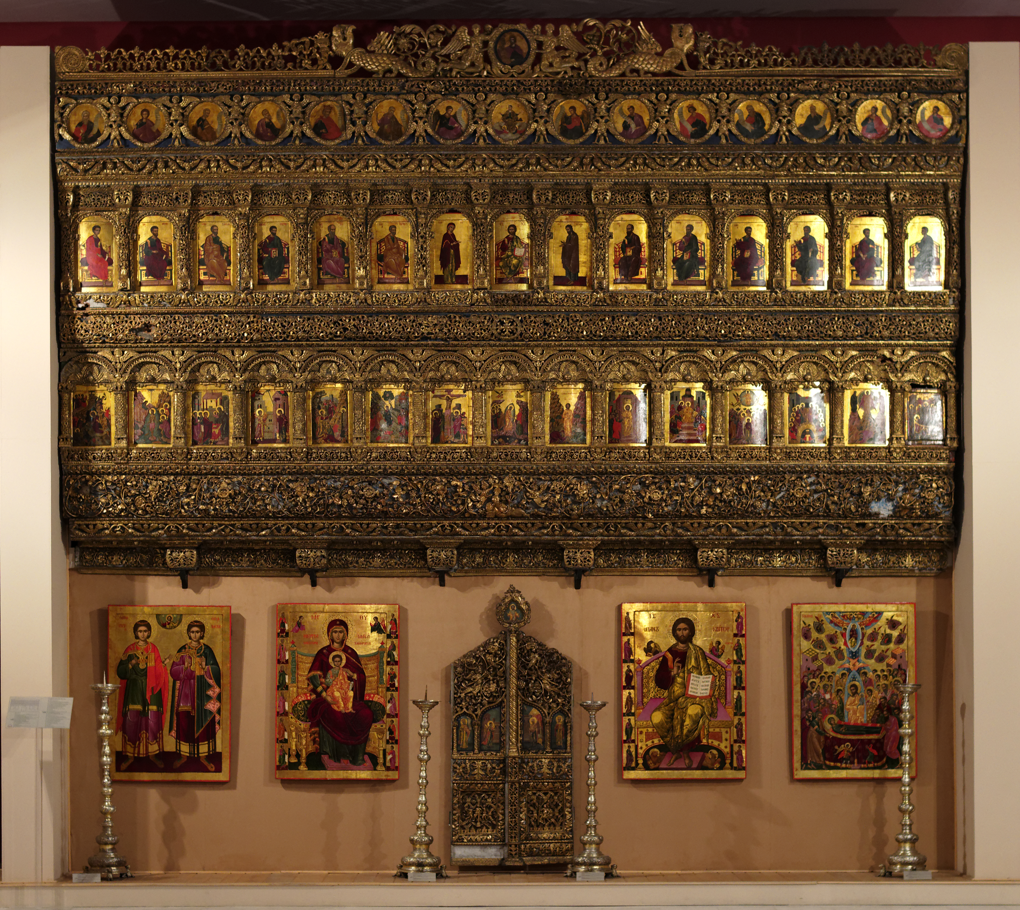 Iconostase du monastère Cotroceni, ca1680. Exposé au musée d'art de Roumanie, Bucarest